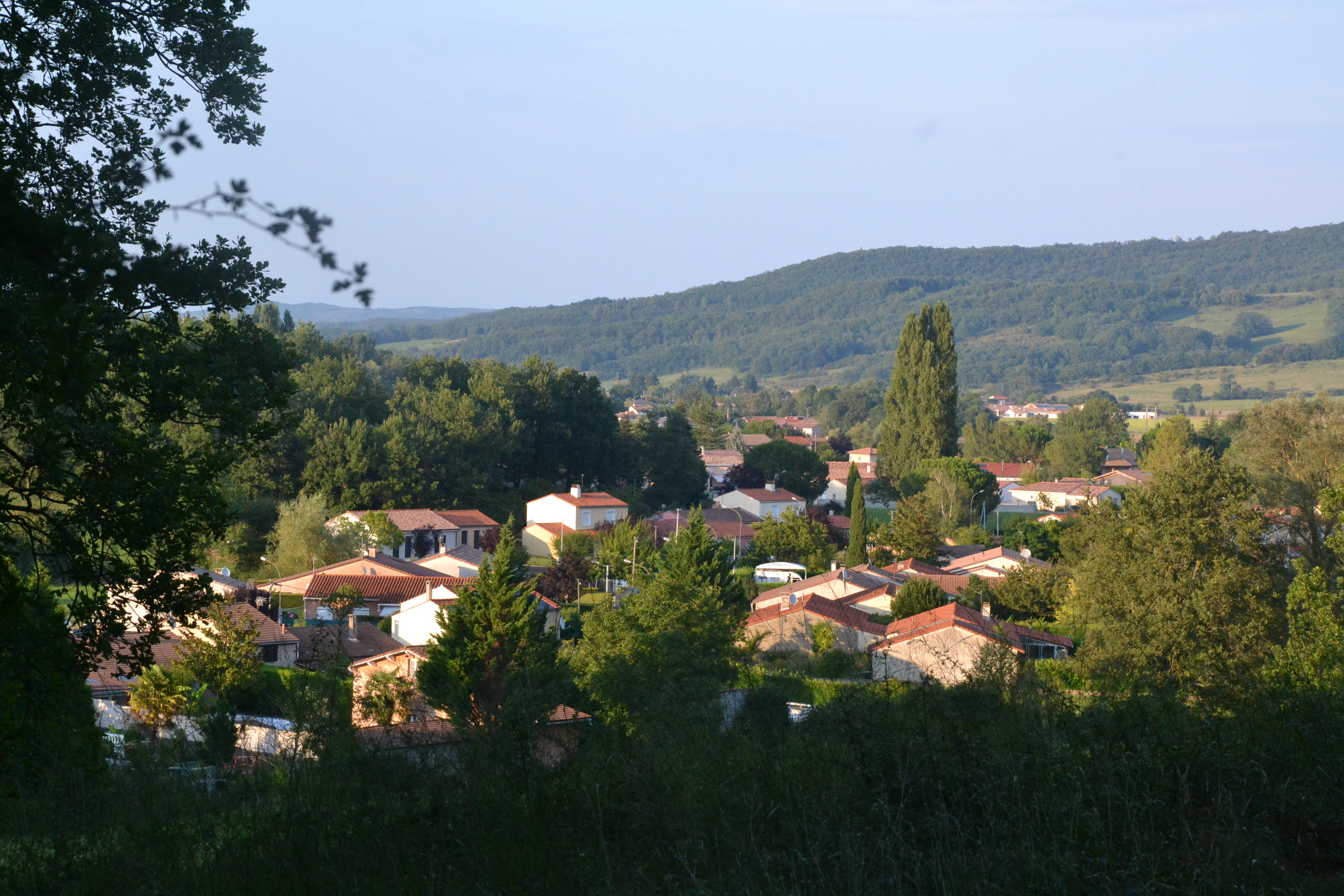 Le bas du village de Tabre (Ariège, France).